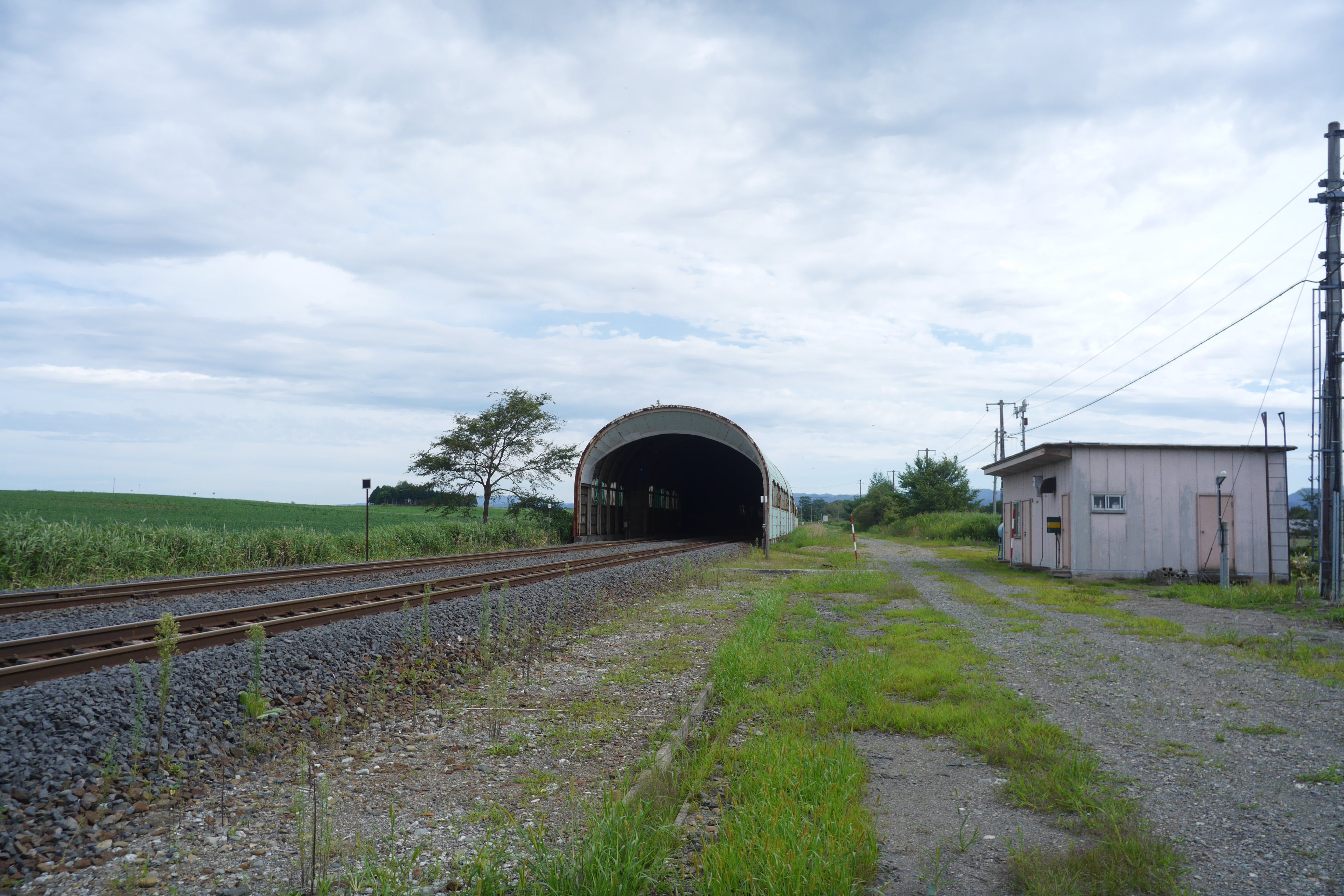 ホームが撤去された後の東追分信号場（JR北海道）です。